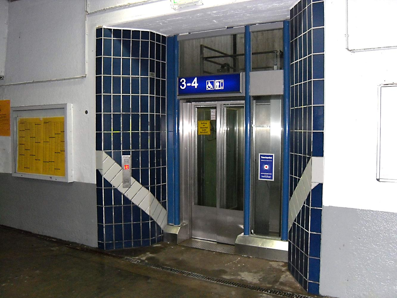 Station Benrath (Düsseldorf)